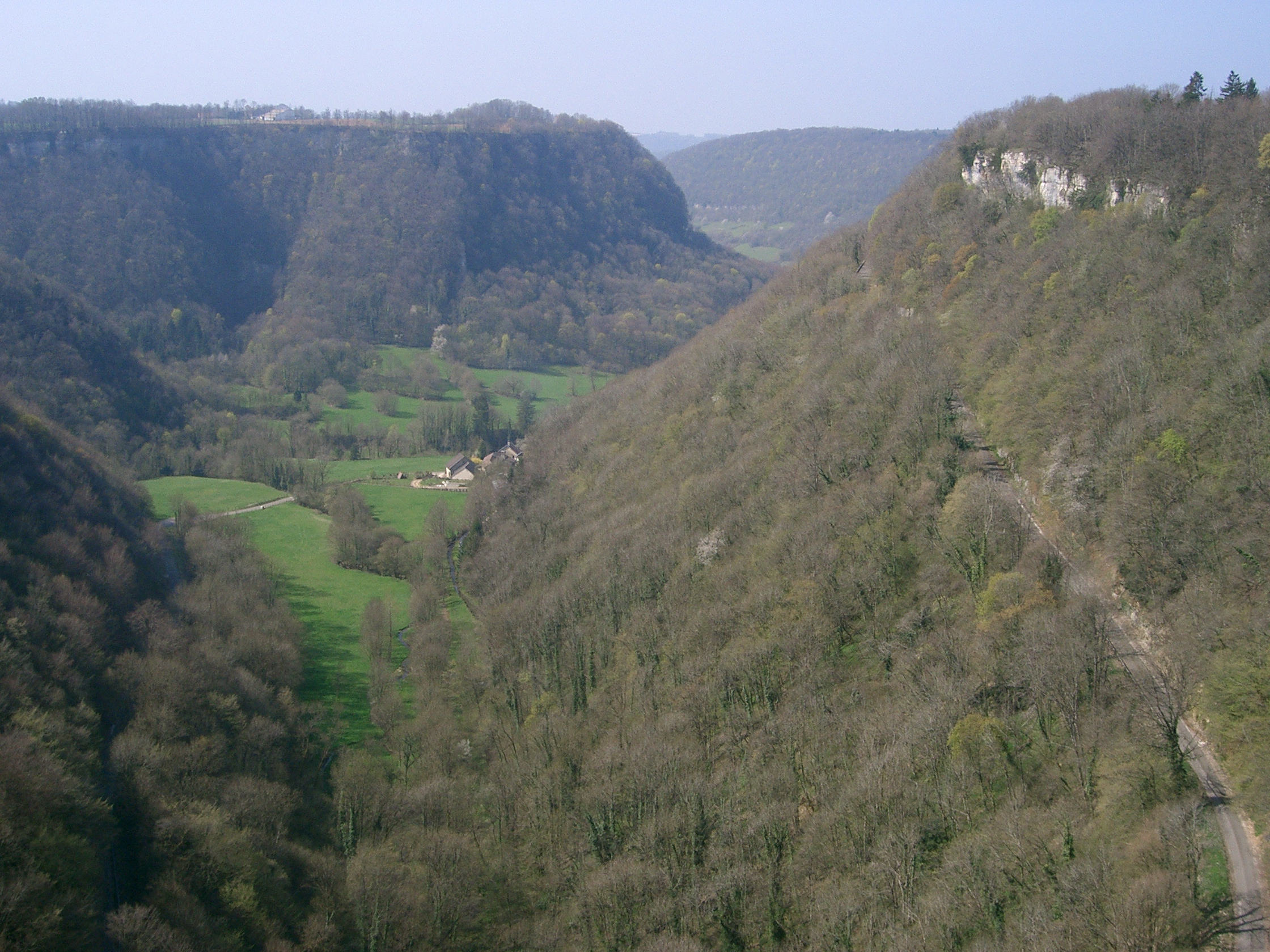 site de Ladoye-sur-Seille dans le département du Jura - reculée